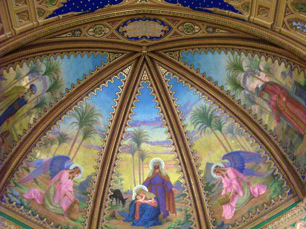 Afresco de Arnaldo Mecozzi, na cúpula da Catedra Nª.Srª do Desterro de Jundiaí,SP/Brasil. Restaurado por Mauro Andreatti. Representa a Sagrada Família em desterro para o Egito, protegidos por dois Arcanjos.